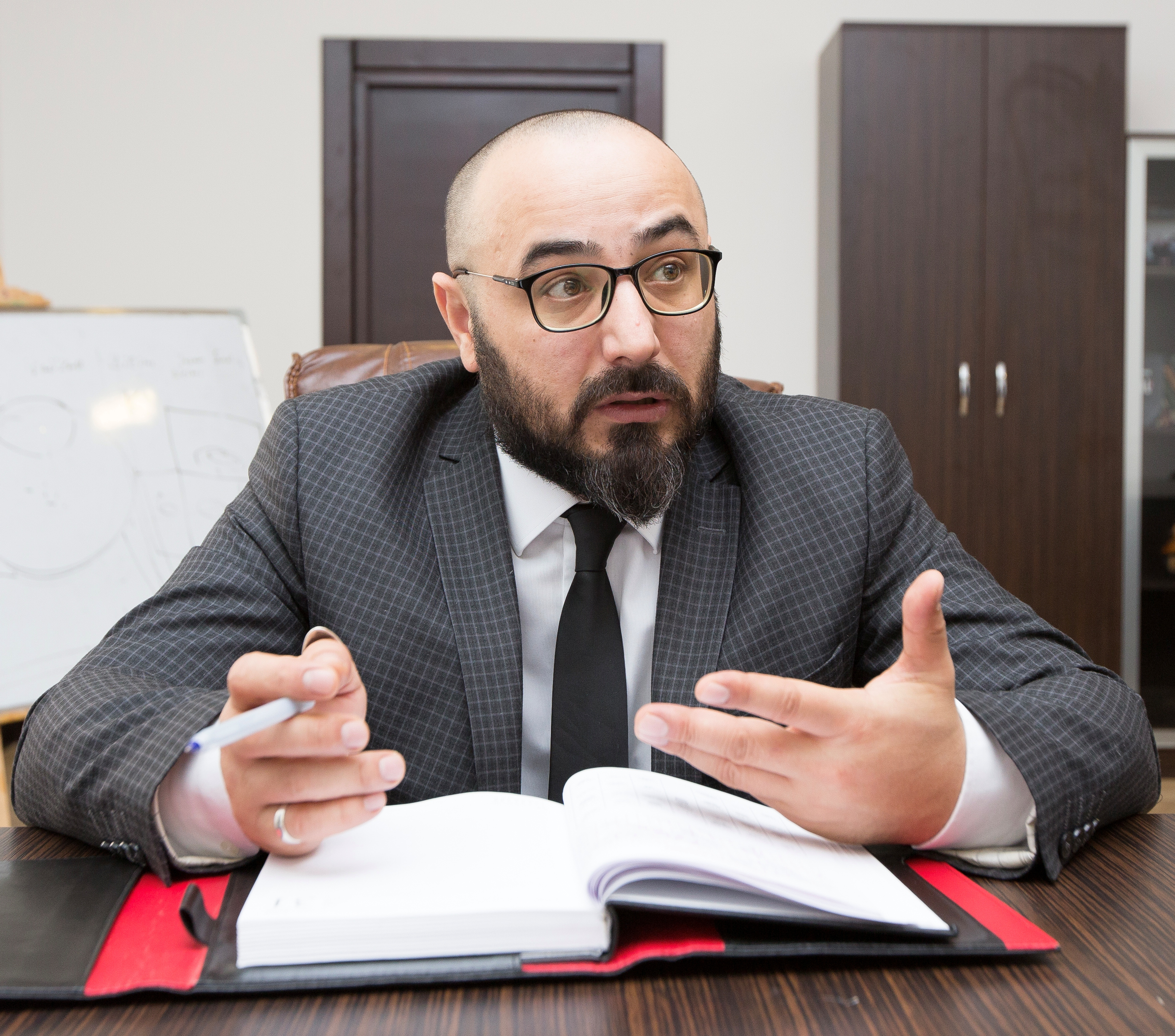 Eltən Qədimbəyli